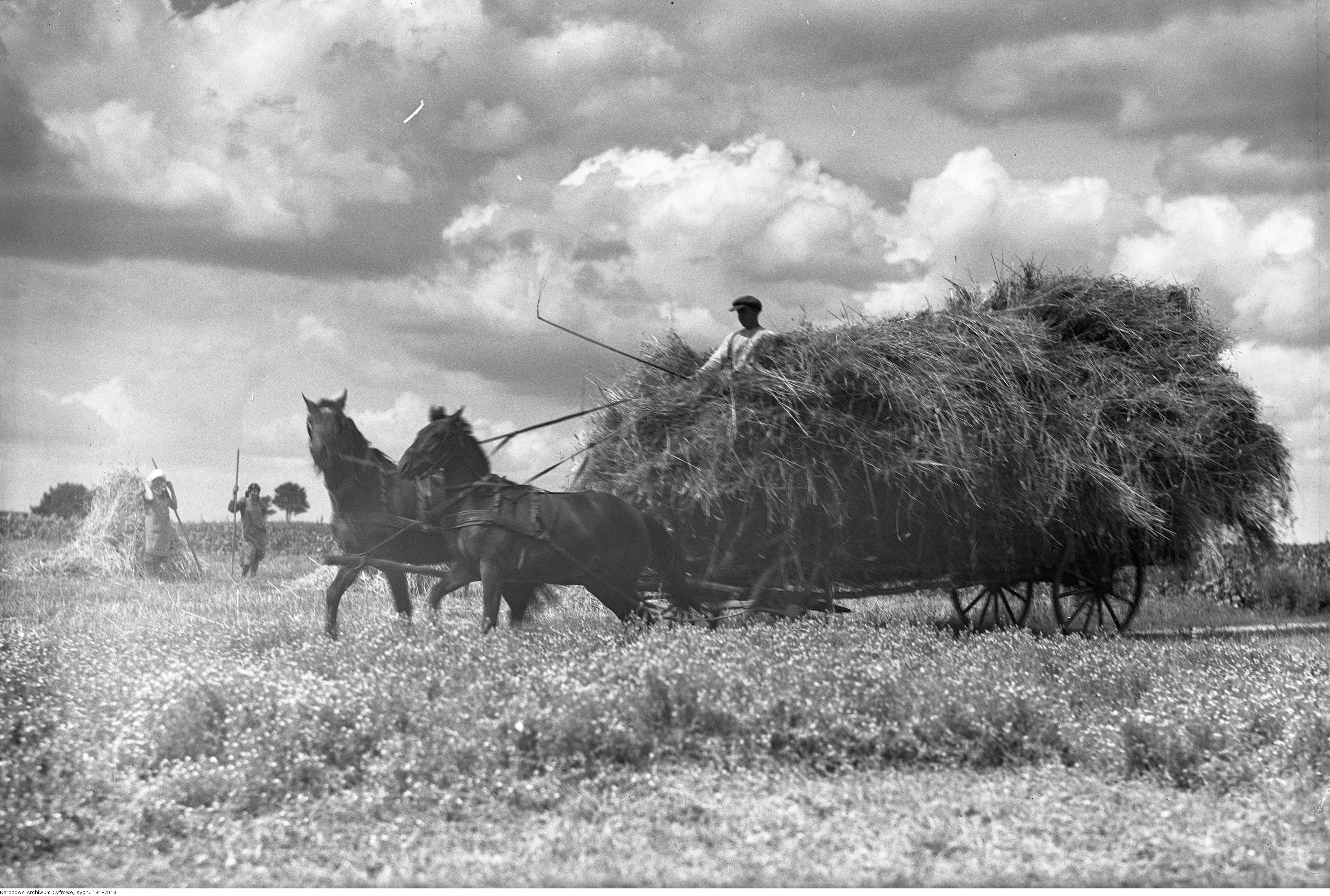 Zwózka.